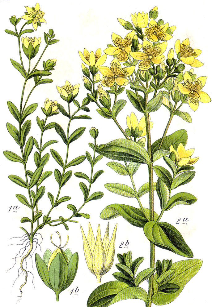 1. Hypericum humifusum L.2. Hypericum tetrapterum Fr. Original Caption 1. Liegendes Johanniskraut, Hypericum humifusum 2. Vierflügeliges Johanniskraut, H. tetrapterum